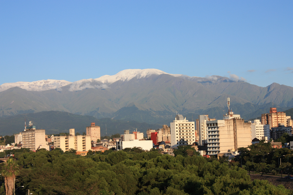 View of San Salvador de Jujuy, Argentina